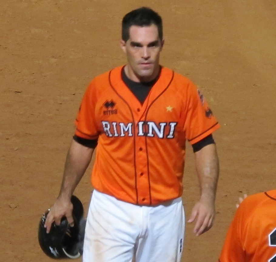 Juan Pablo Angrisano, ricevitore italo-argentino in forza al Rimini Baseball, durante gara4 delle Italian Baseball Series, ovvero la serie finale che assegna lo scudetto italiano.